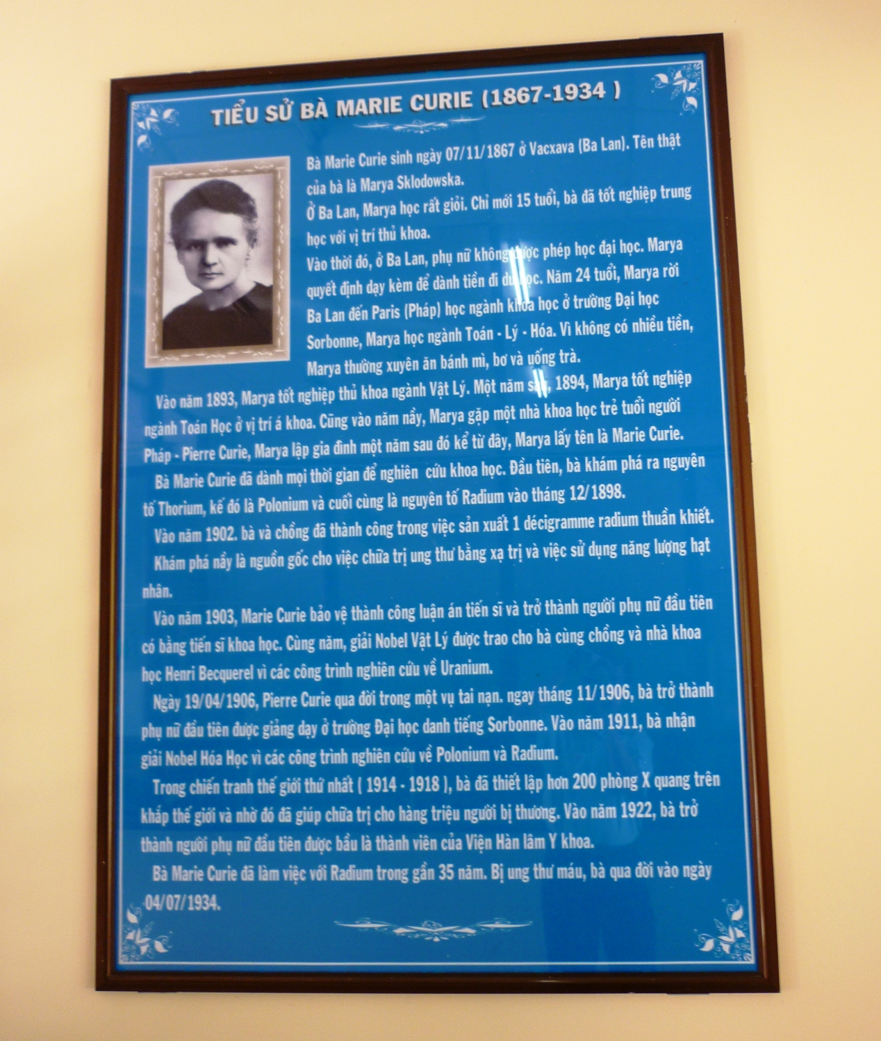 Tiểu sử bà Marie Curie. Biography of Marie Curie in Vietnamese at Marie Curie high school.